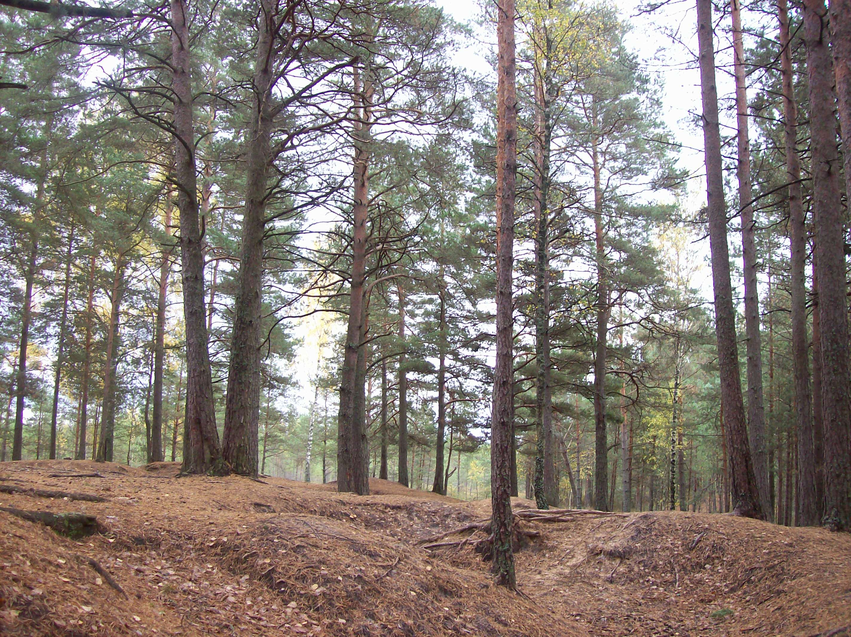 Kemeri national park